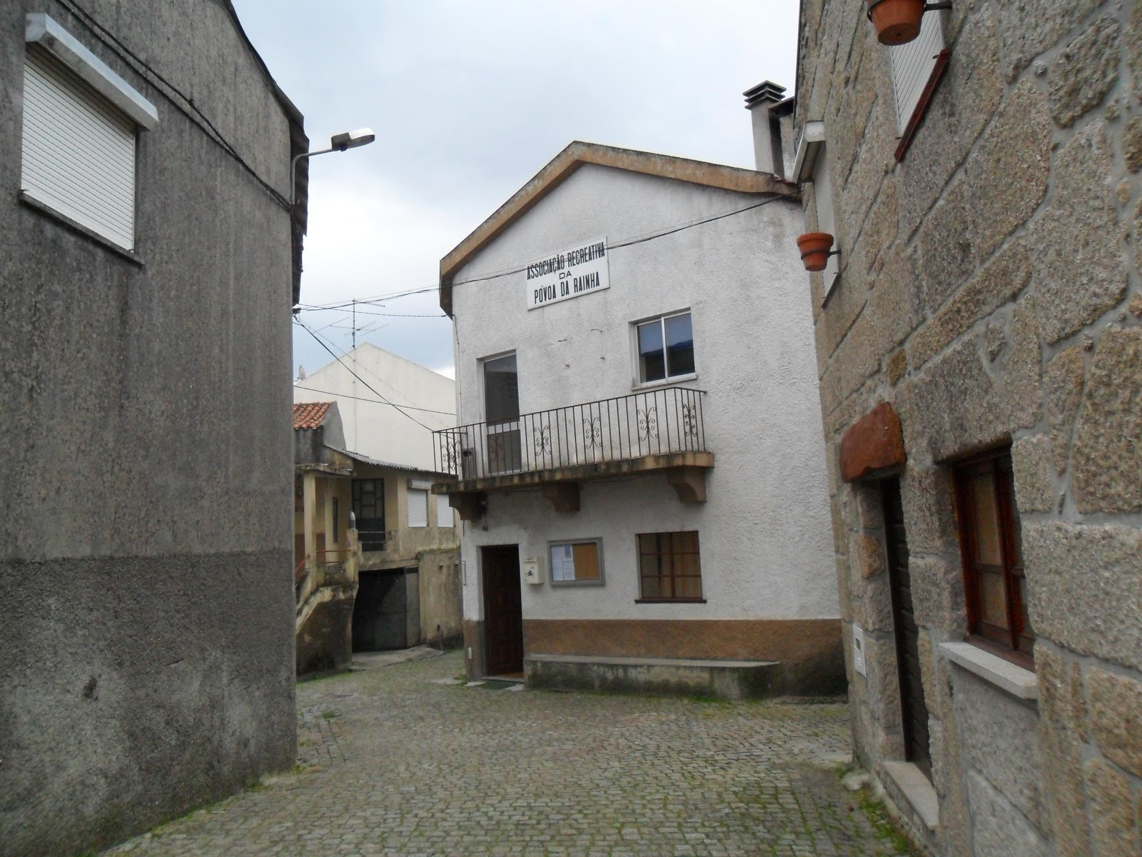 Edifícioo da Associação Recreativa da Póvoa da Raínha